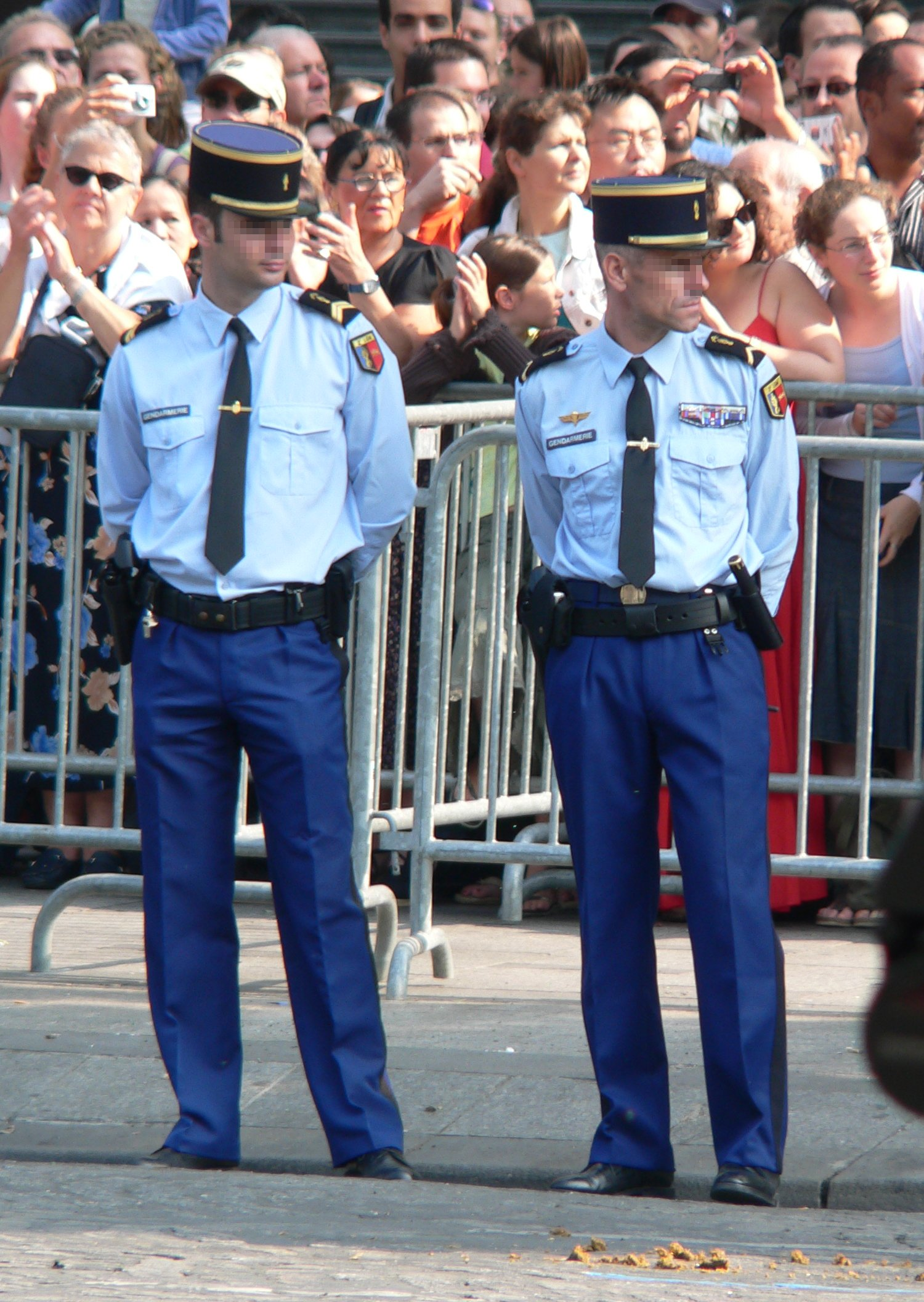 Gendarmerie nationale de France. Gendarmes. Military parade, Avenue des Champs-Élysées, 14 July 2006